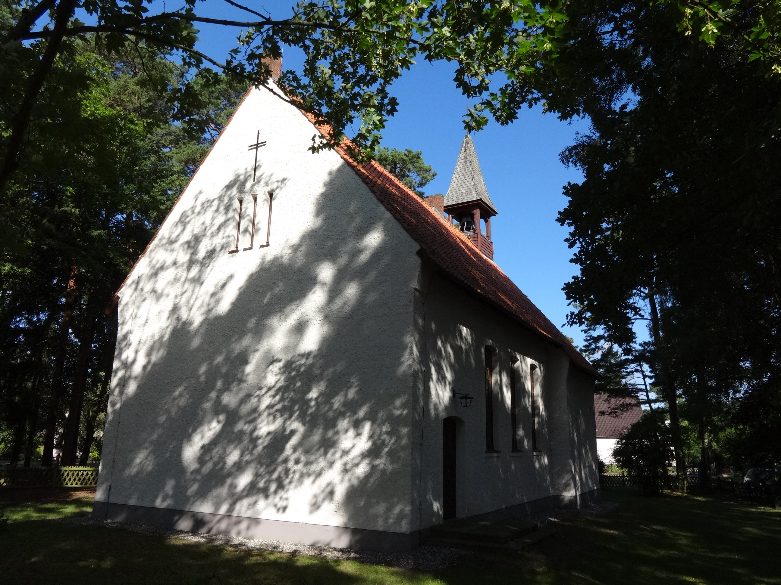 Petrikirche aus 1955 in Lubmin, Landkreis Vorpommern-Greifswald, mit neuzeitlicher Ausstattung, u.a. Fischerteppich